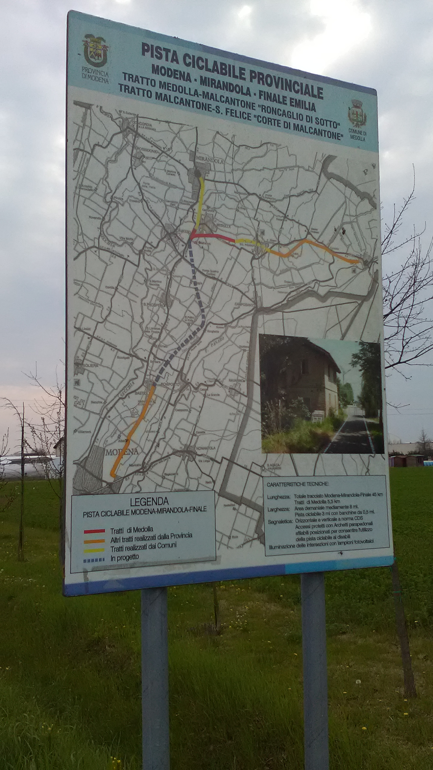 Cartello della pista ciclabile provinciale Modena - Mirandola - Finale Emilia